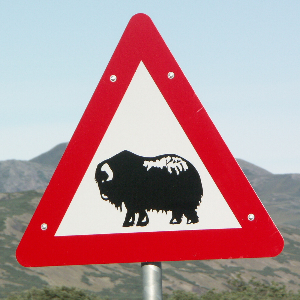 Umimmak (musk ox) warning sign in Kangerlussuaq, Greenland.